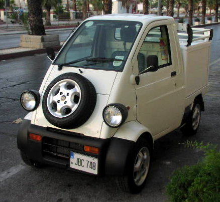 Daihatsu Midget II